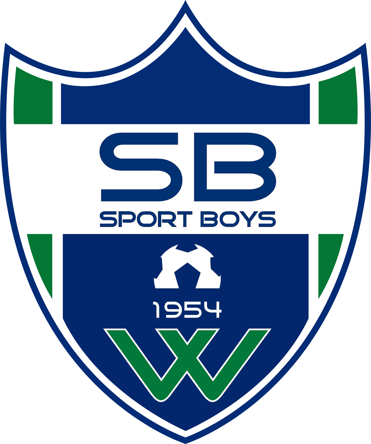 sports boys